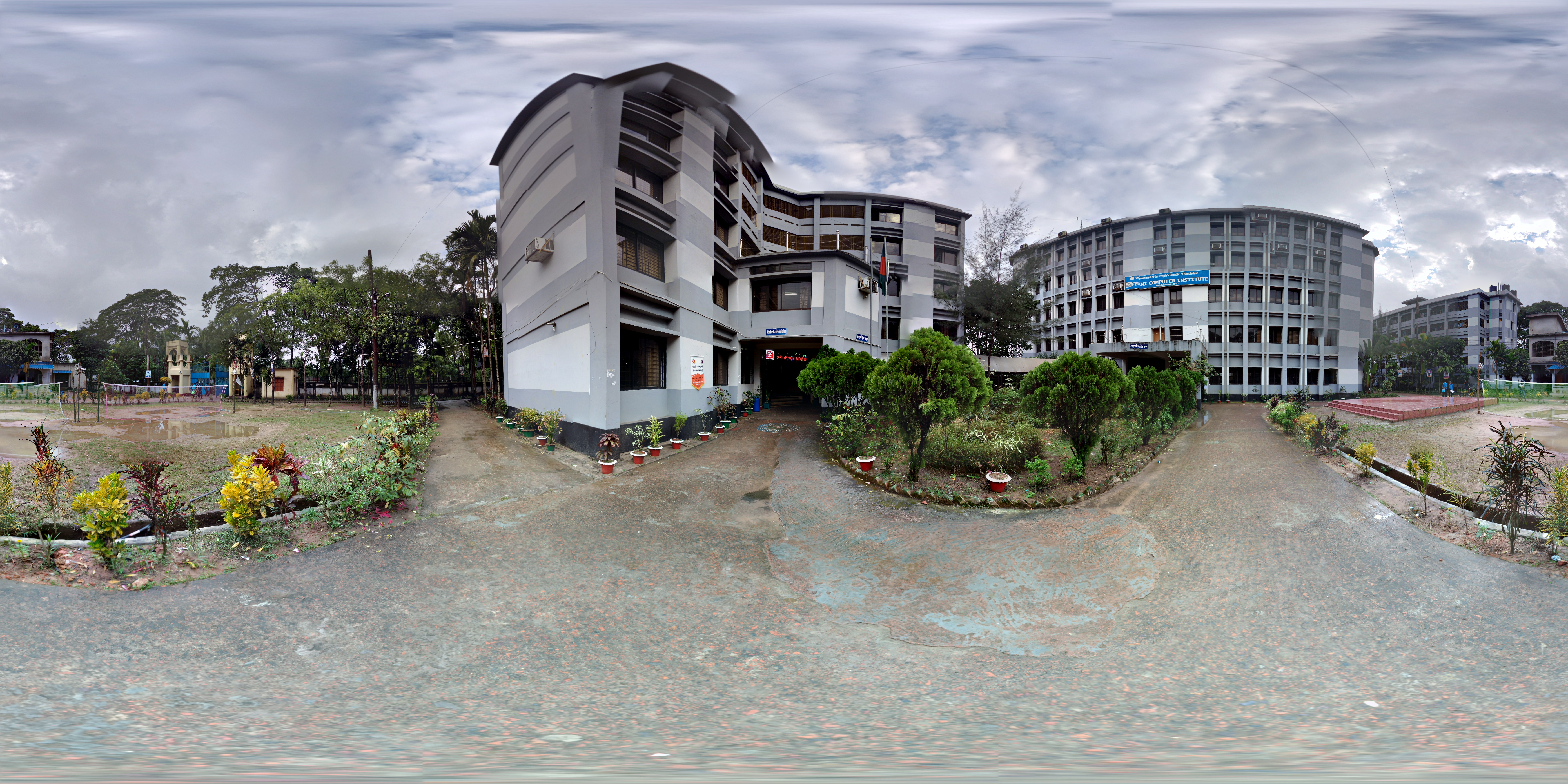 360-degree view if fci, in front of the administration building.